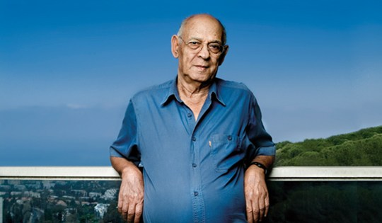 סמי מיכאל - ספרות